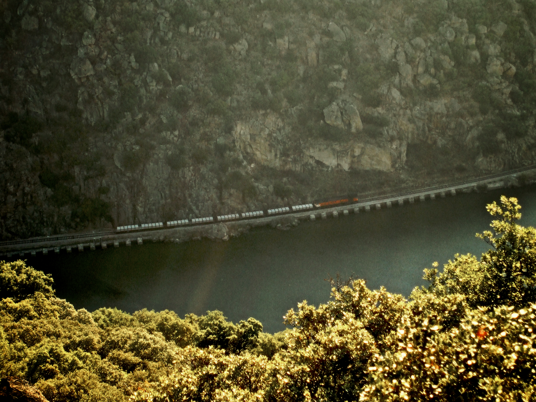 Tipo: Comboio de Transporte de Cimento 75321 [Vila Nova de Gaia - Pocinho] Local: Valeira [Linha do Douro, PK 148] Data e hora: 29 de Setembro de 2008 [08h29] Material: Locomotiva 19xx + 4 vagões CP Rlps som desta foto aqui.